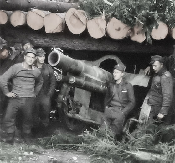 2D/KTR15:sta kuuluvan tykin vahvasti katettu tykkiasema jatkosodassa.